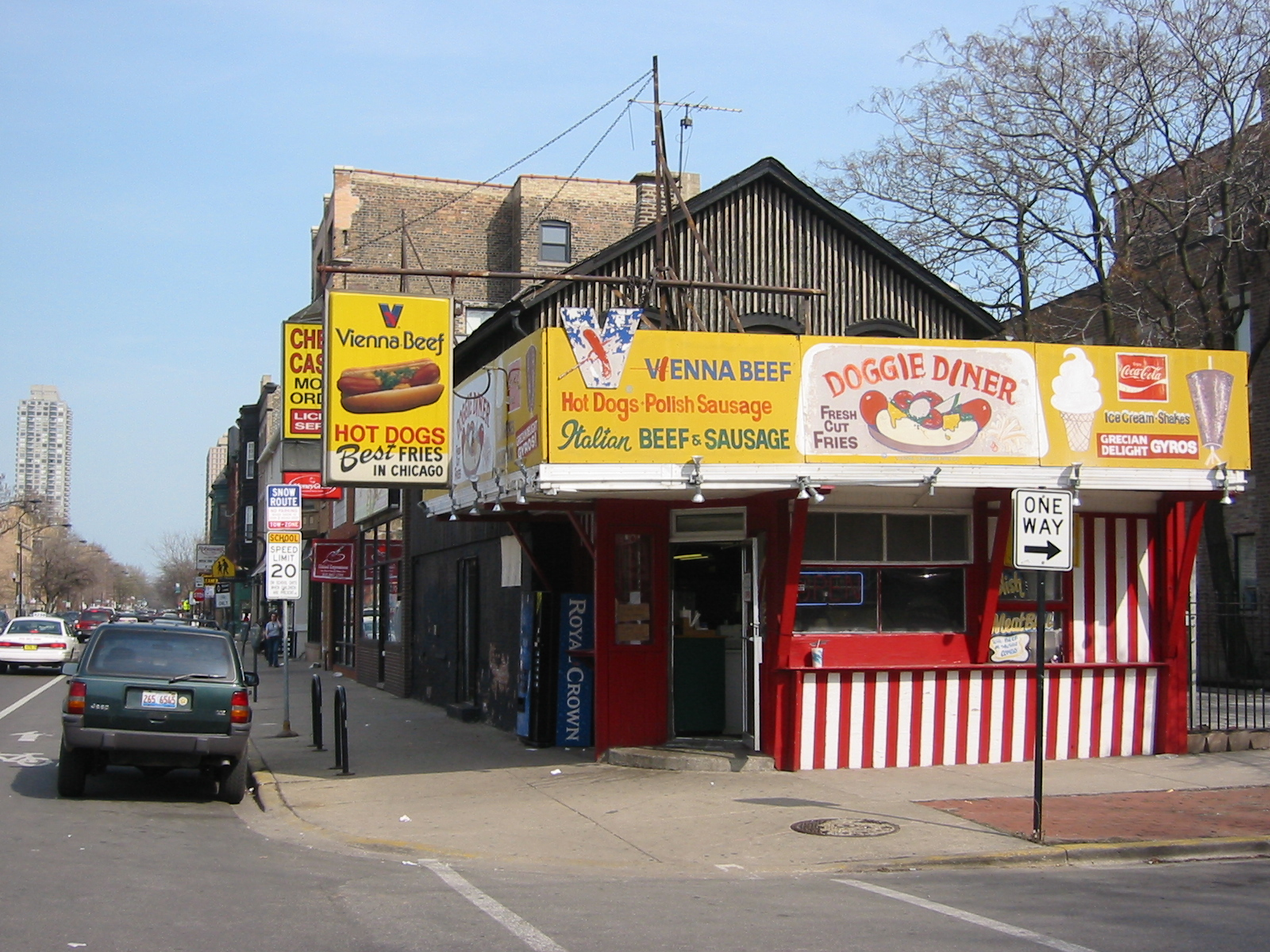 13 Doggie Diner 05